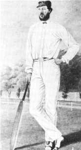 Tom Wills